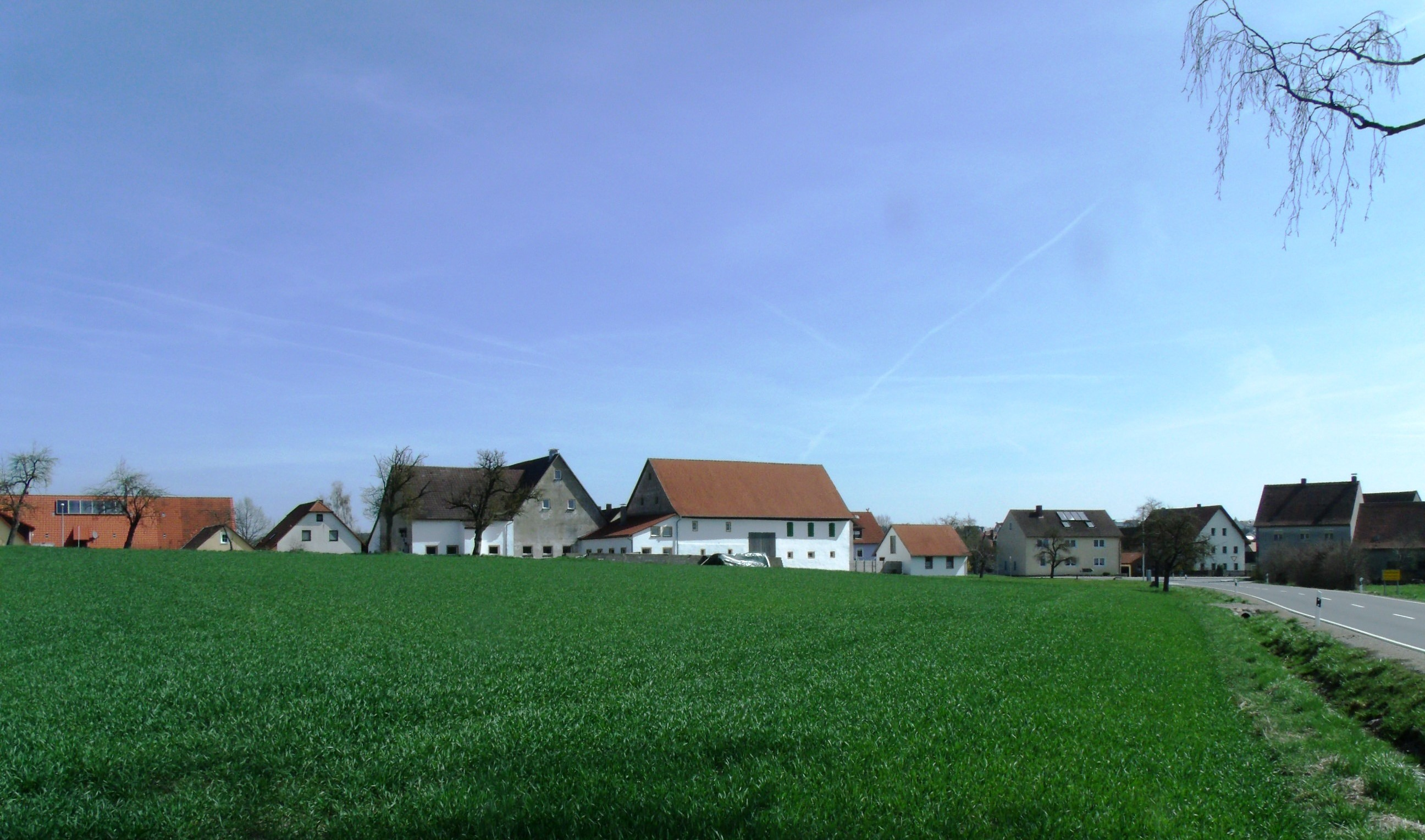 Sachsen, Ortsteil von Leutershausen im Landkreis Ansbach